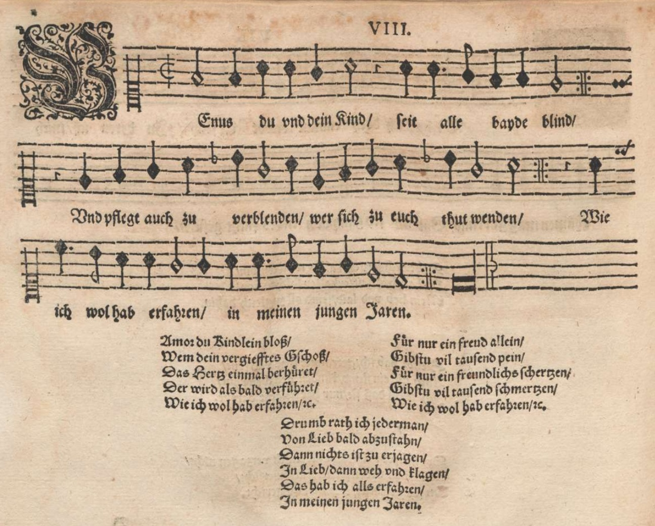 Jacob Regnart: Venus du und dein Kind, Melodiestimme des dreistimmigen Satzes